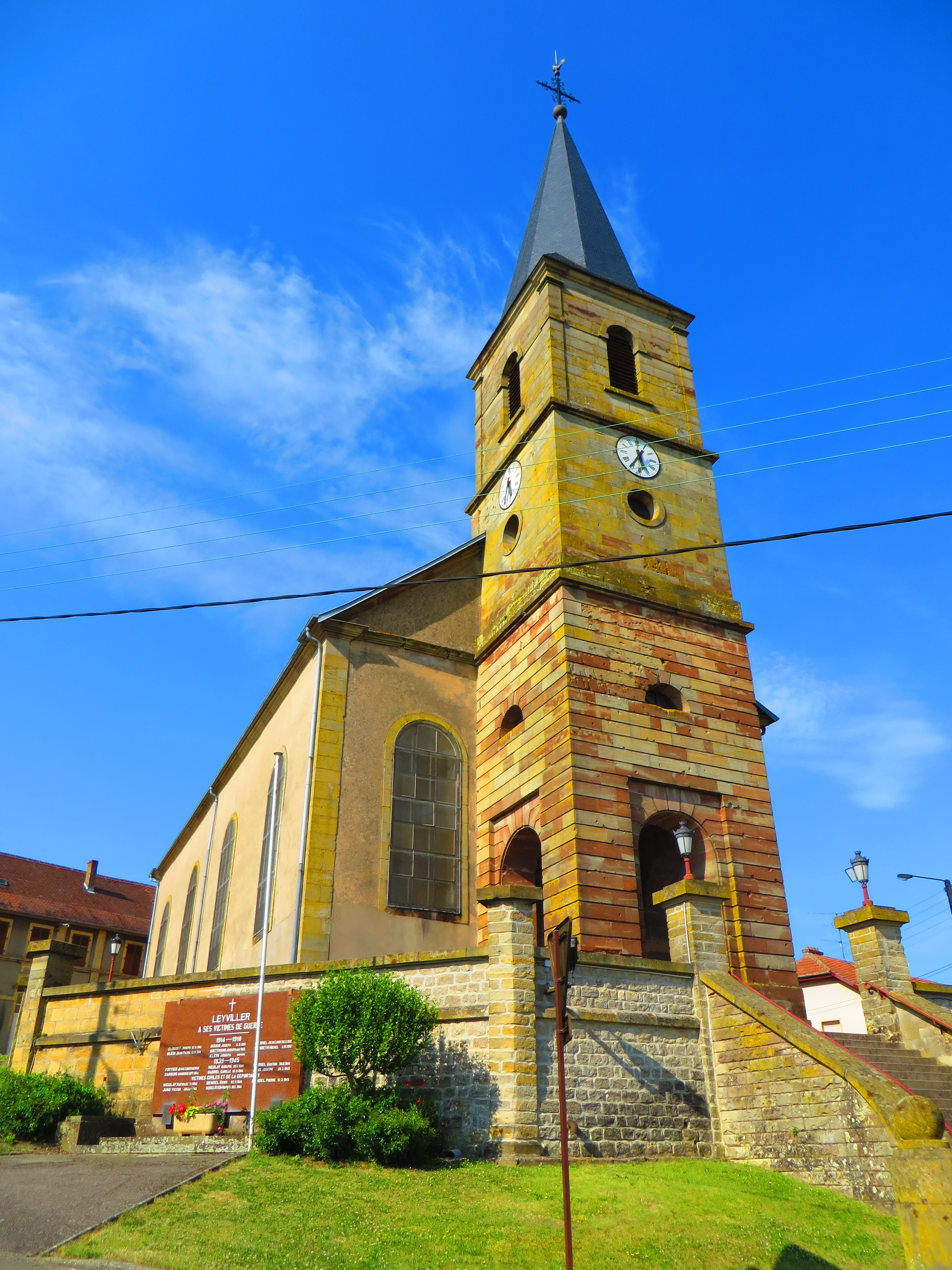 Leyviller eglise